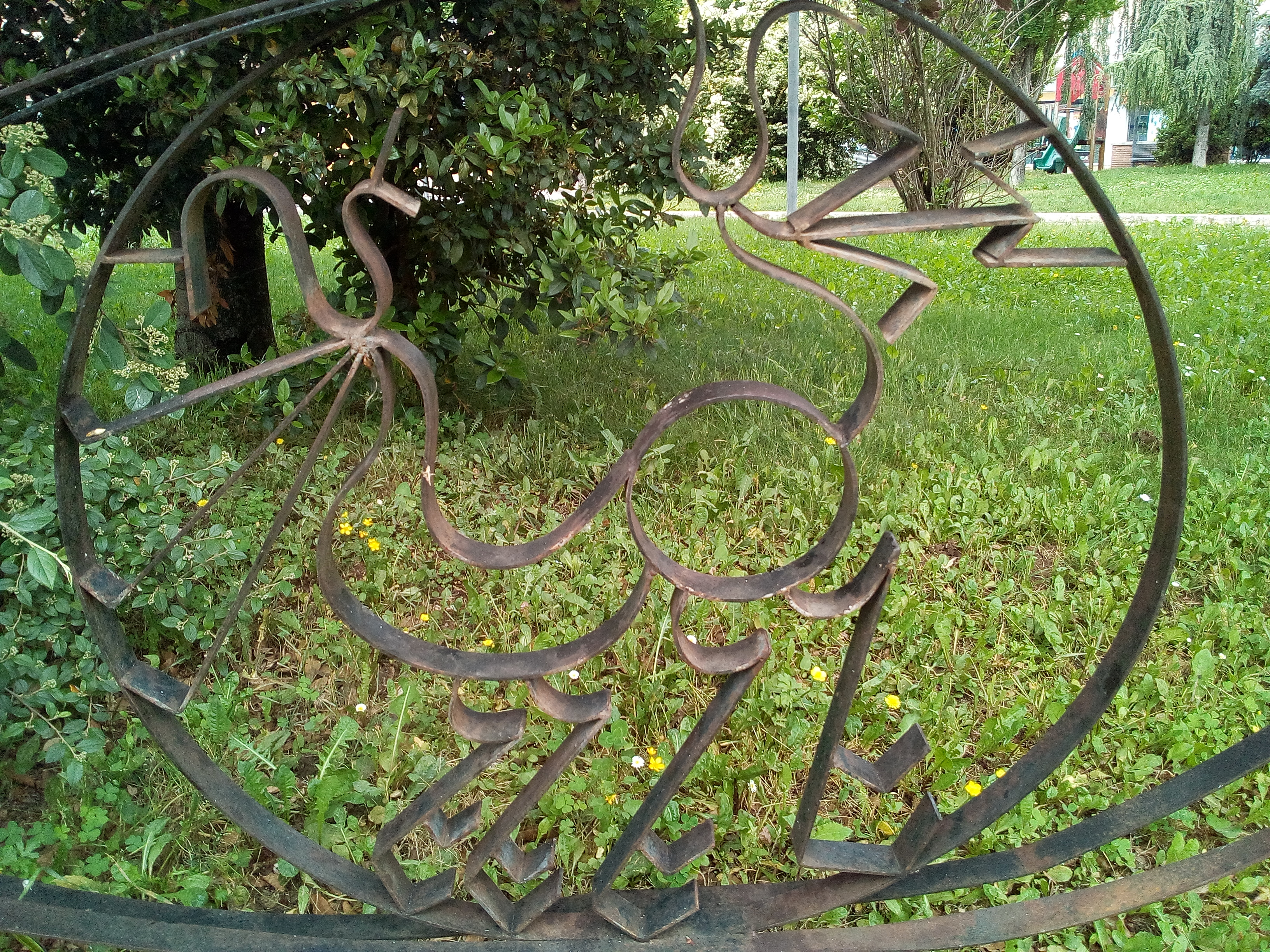 Scultura ferrea della chimera, simile al simbolo decorativo dei kardiophylax marsi